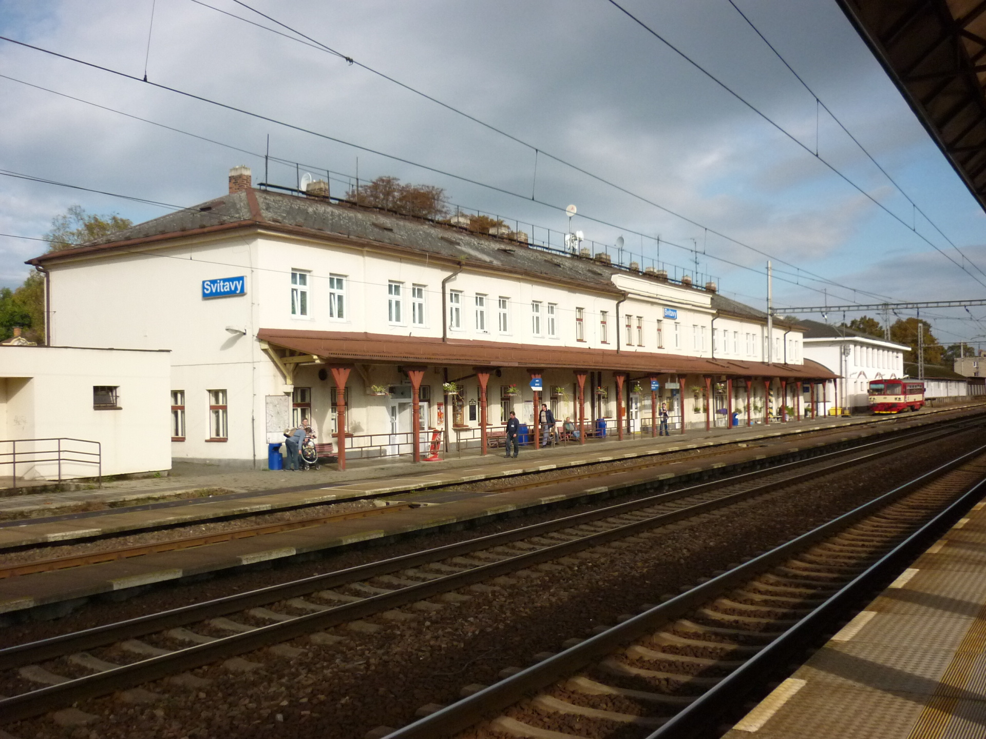 Svitavy - nádraží ČD